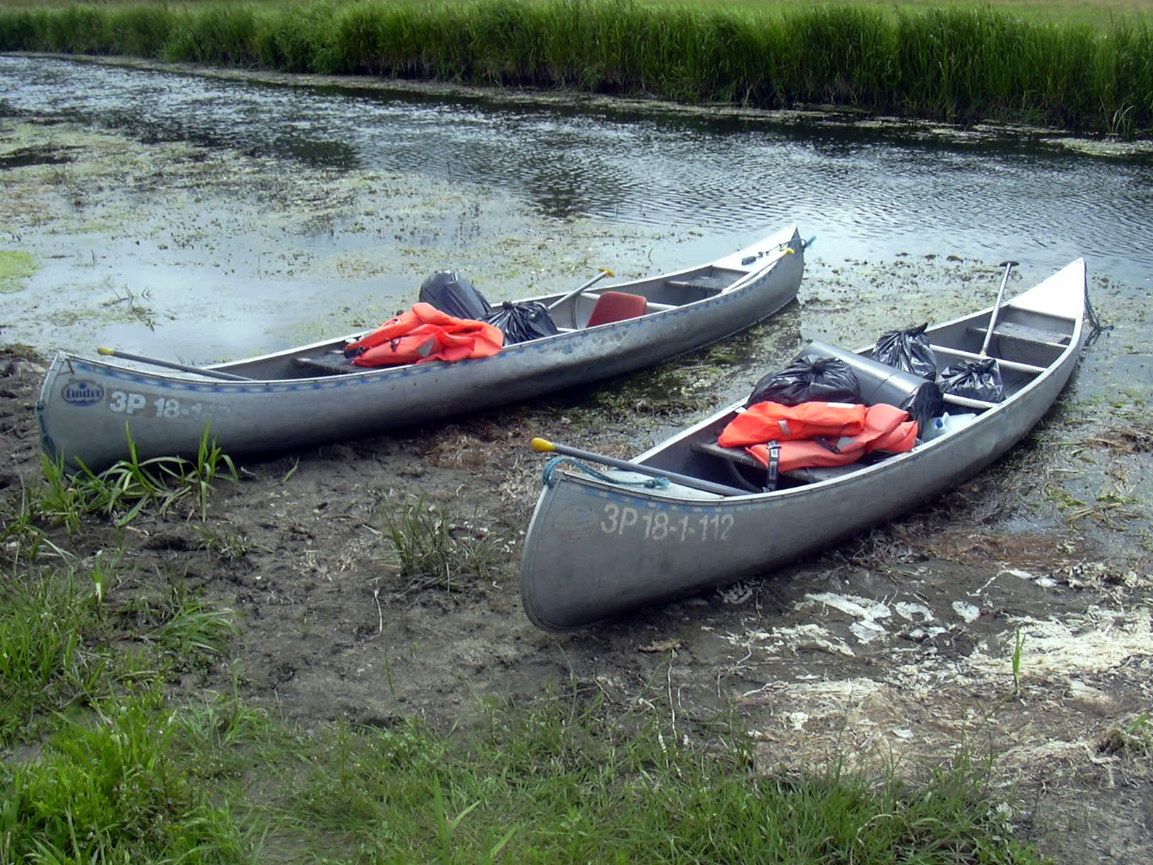 Kanoer (mærke Linder) med baggage på land ved Susåens bred